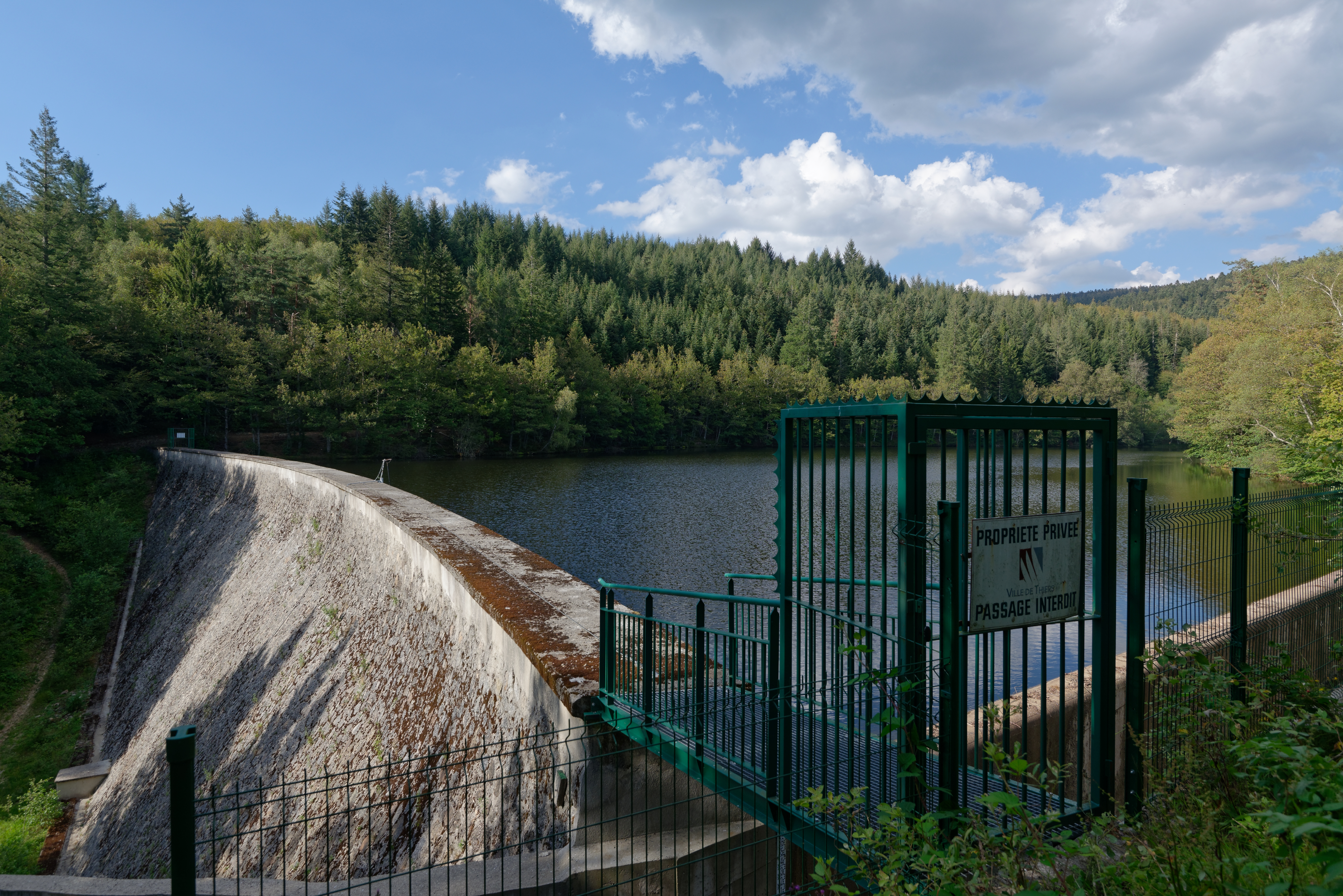 Le barrage de la Muratte, situé à la frontière des communes de Palladuc et de Saint-Victor-Montvianeix. Il sert de réserve d'eau potable pour la ville de Thiers.